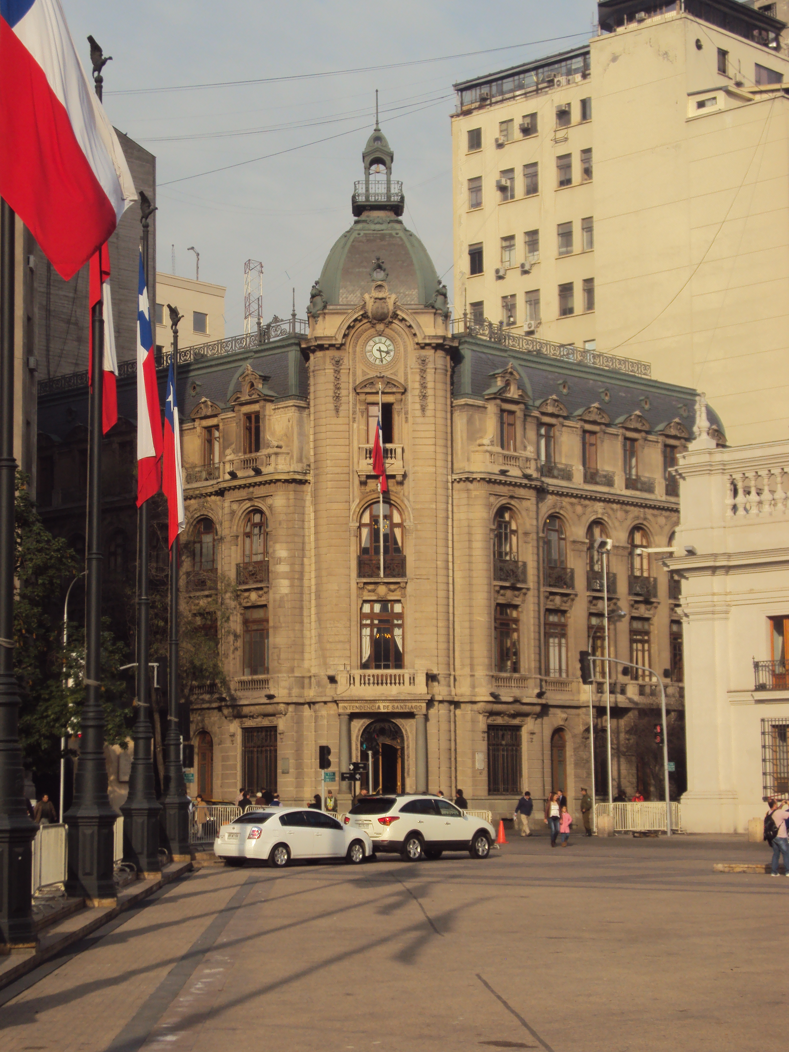 Edificio de la Intendencia Metropolitana de Santiago This is a photo of a national monument in Chile: 232